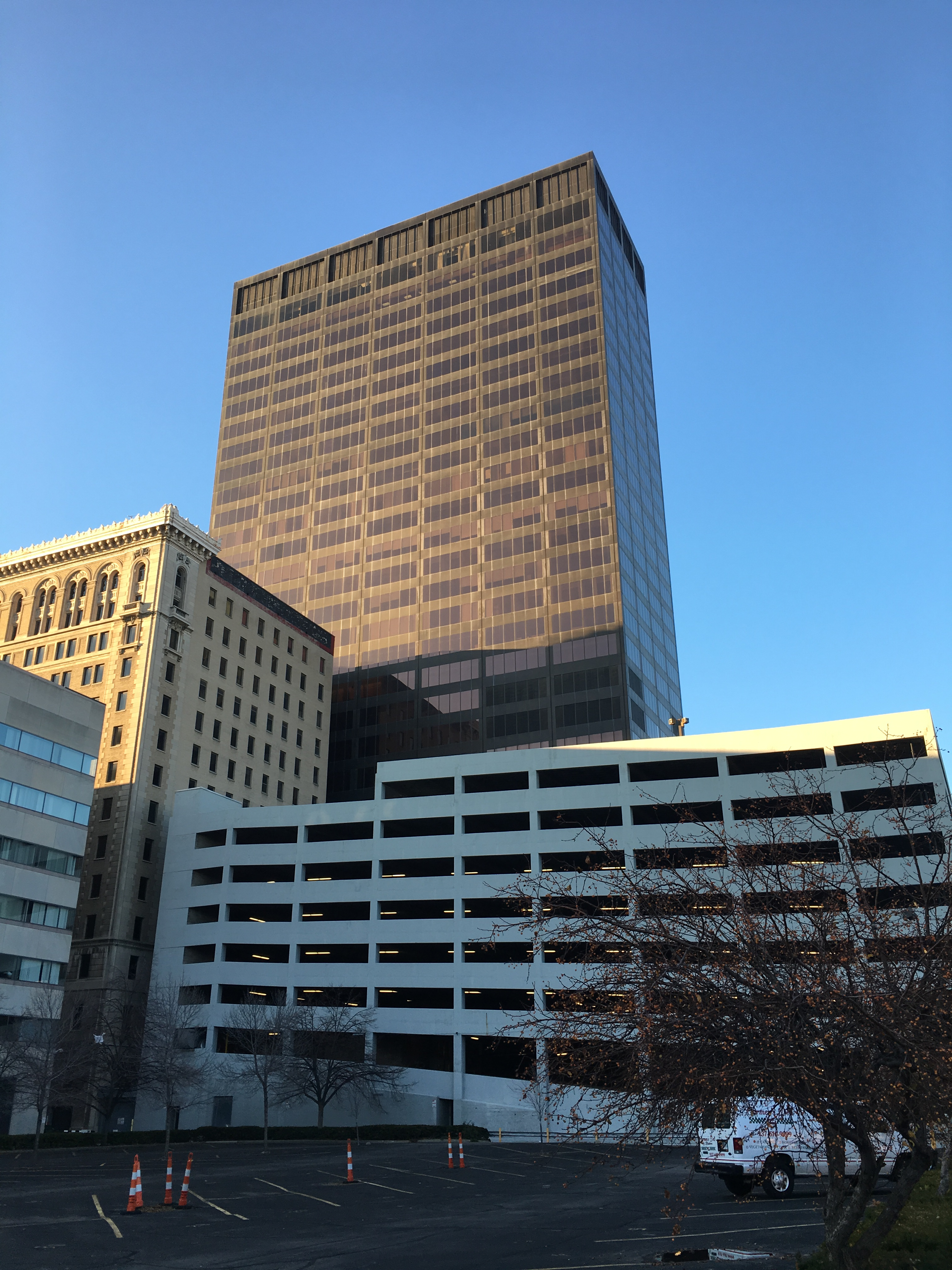 Kettering Tower in 2015